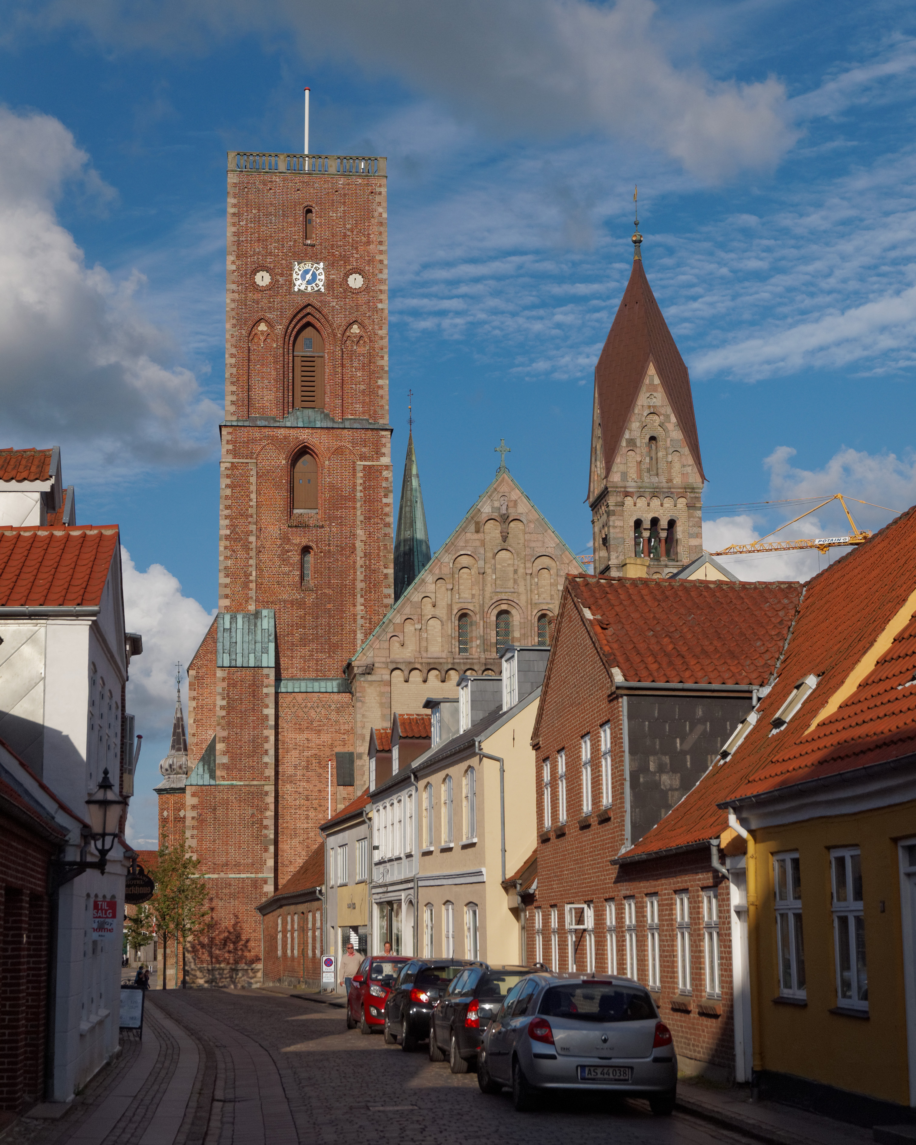 Türme des Doms zu Ribe, Jütland, Dänemark, Ansicht von Westen